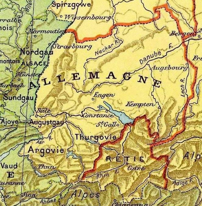 uitsnede uit: Partage de l'Empire carolingien au Traité de Verdun en 843.JPG